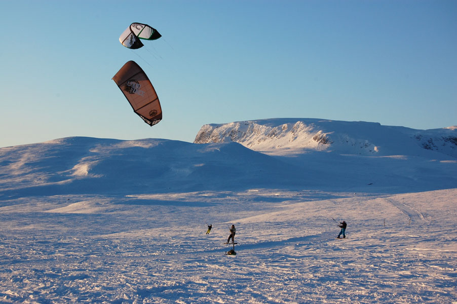 Kiting ved Hallingskarvet Geilo